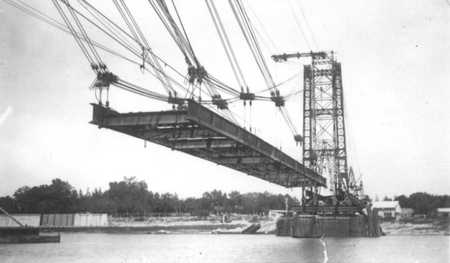 Construcción del Puente Colgante de Santa Fe. Año 1924.